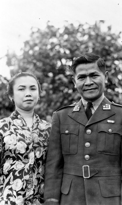 Repronegatief. Portret van kolonel Abdulkadir Widjojoatmodjo en zijn echtgenote